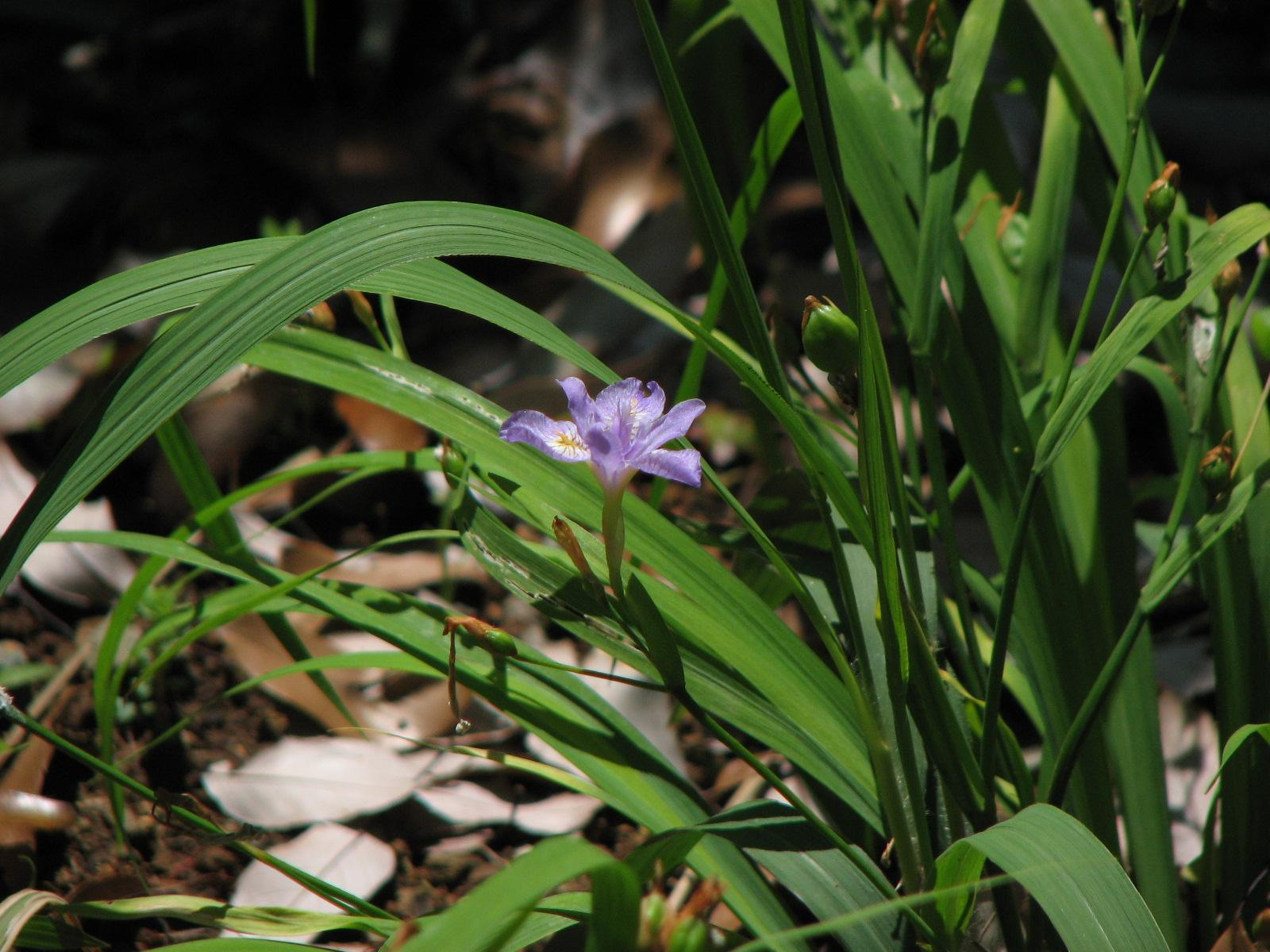 Iris gracilipes(ヒメシャガ)